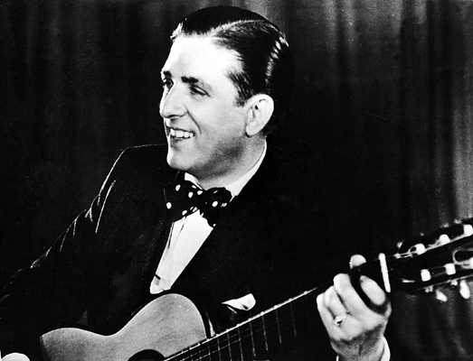 Ignacio Corsini (1891—1967)